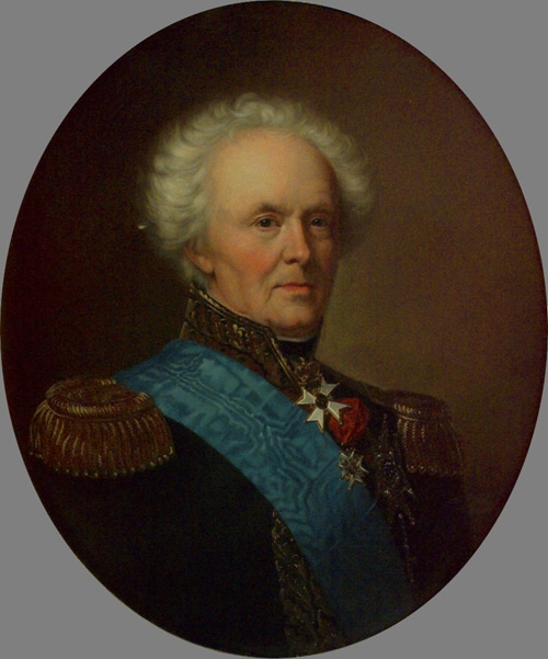 Porträtt av Fältmarskalken Curt von Stedingk (1746-1837) iklädd uniform för en fältmarskalk. Över axeln bär han Serafimerordens band, samt på bröstet dess kraschan. Runt halsen bär han Svärdsordens kommendörskors, och på bröstet kraschan för Riddare med stora korset av Svärdsorden. I rött band bär han även franska hederslegionen. Målning från ca 1830 av Carl Wilhelm Nordgren.